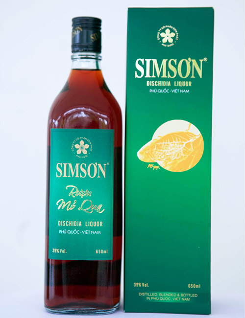 Một trong những thương hiệu rượu Mỏ quạ nổi tiếng tại Phú Quốc